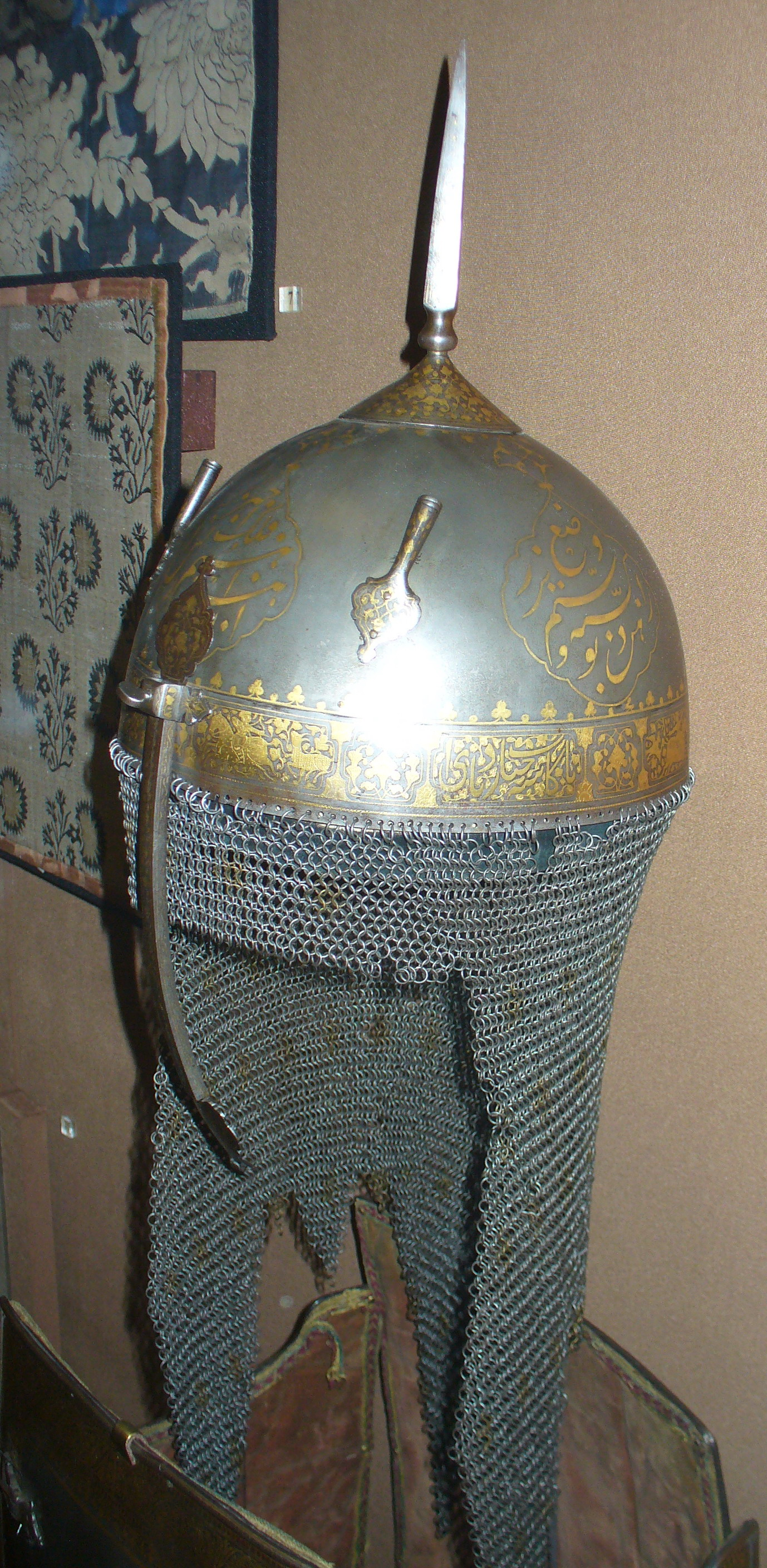 Шлем кулах-худ, Иран, XVII век.